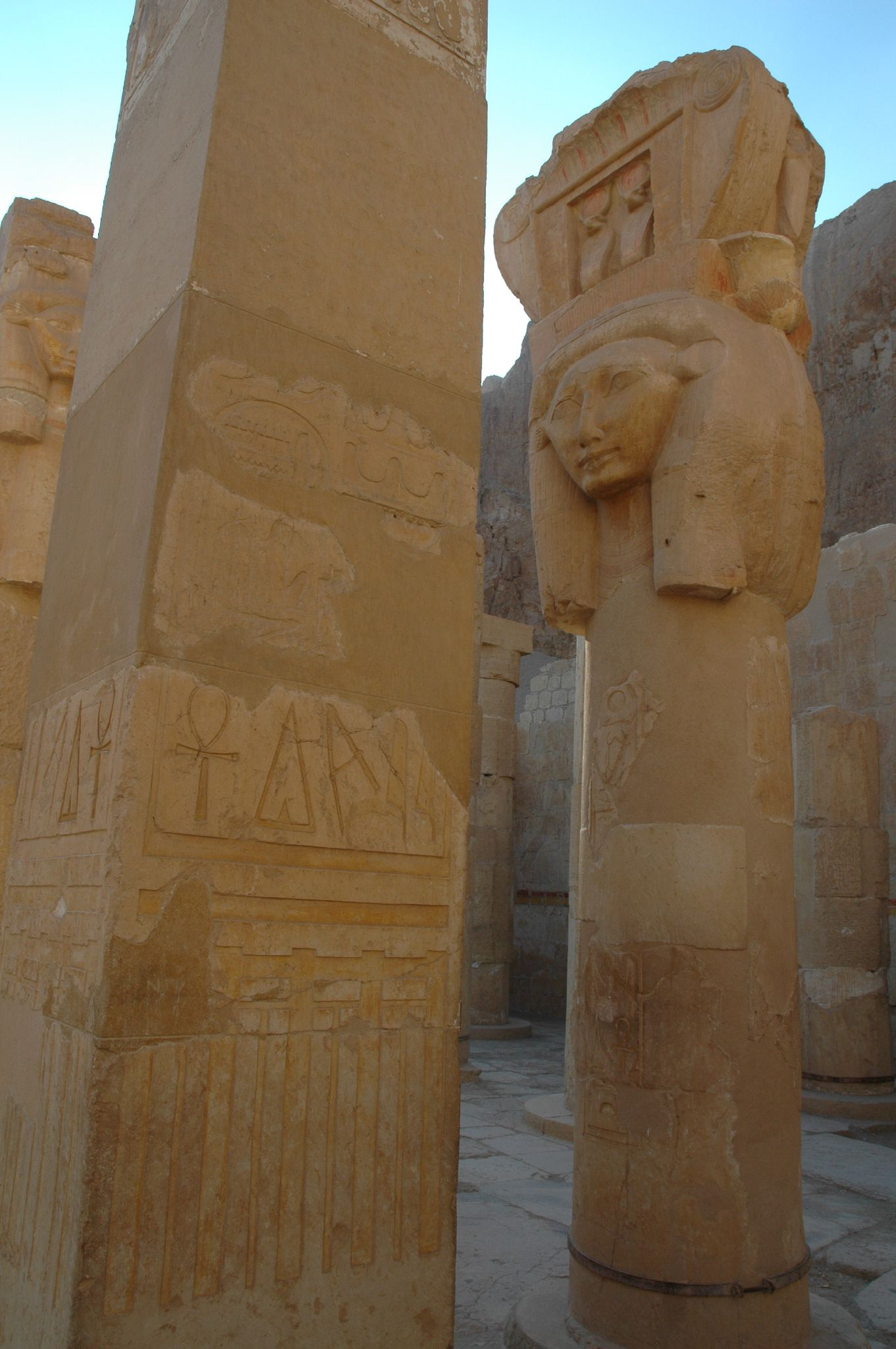 Tempio di Hatshepsut: colonna di Hator